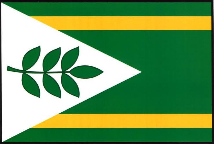 Staré Jesenčany vlajka